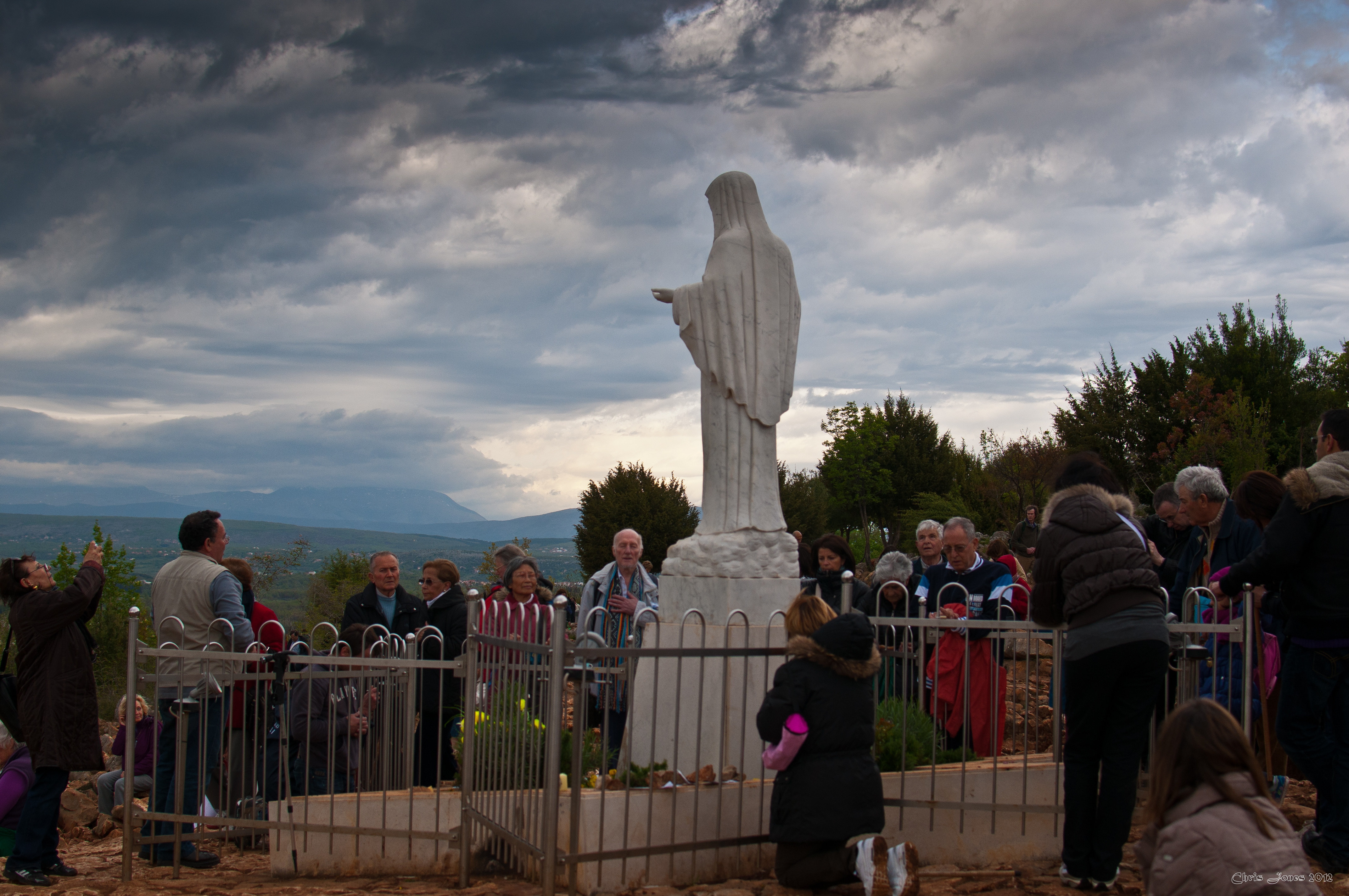 Međugorje